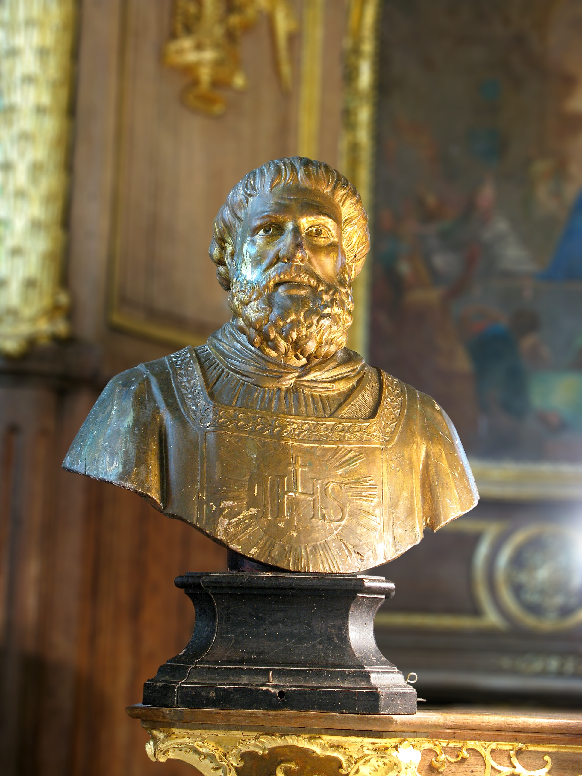 Buste reliquaire de Saint Vénérand. Ce buste se trouve à la gauche du maître-autel de l'église d'Acquigny (France - Normandie - Eure)